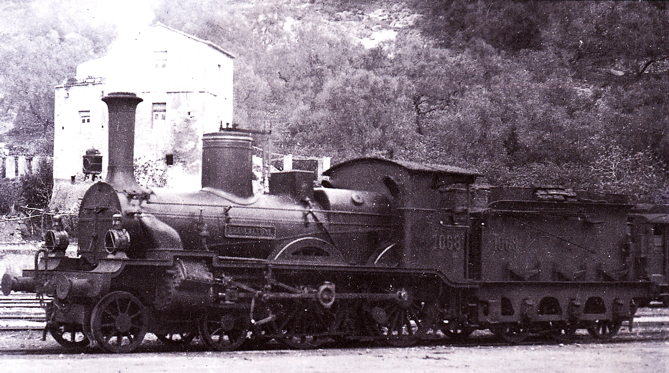 Locomotiva 1068 "Brancaleone" della Rete Mediterranea, poi FS Gr. 510